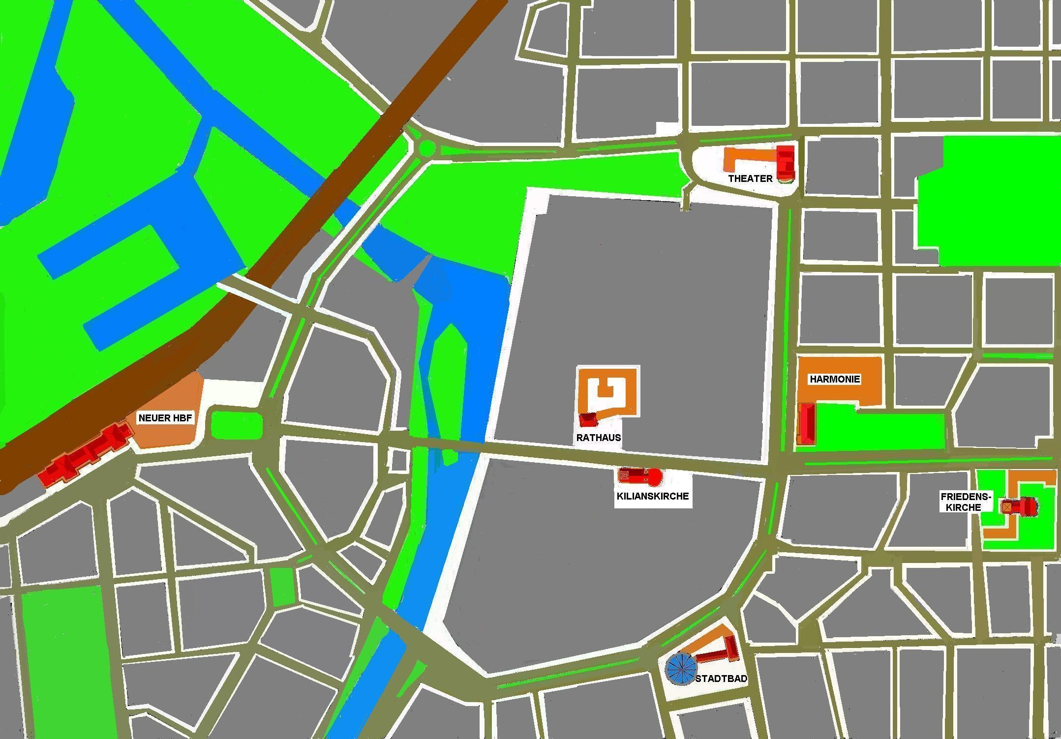 Heilbronn_Altstadt_Verkehrskonzept_von_Gonser_mit_Gonserschem_Ring_vom_2._Dezember_1947.PNG